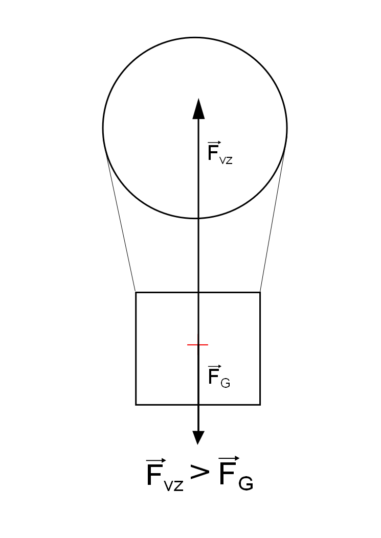 Fyzikální popis horkovzdušného balónu